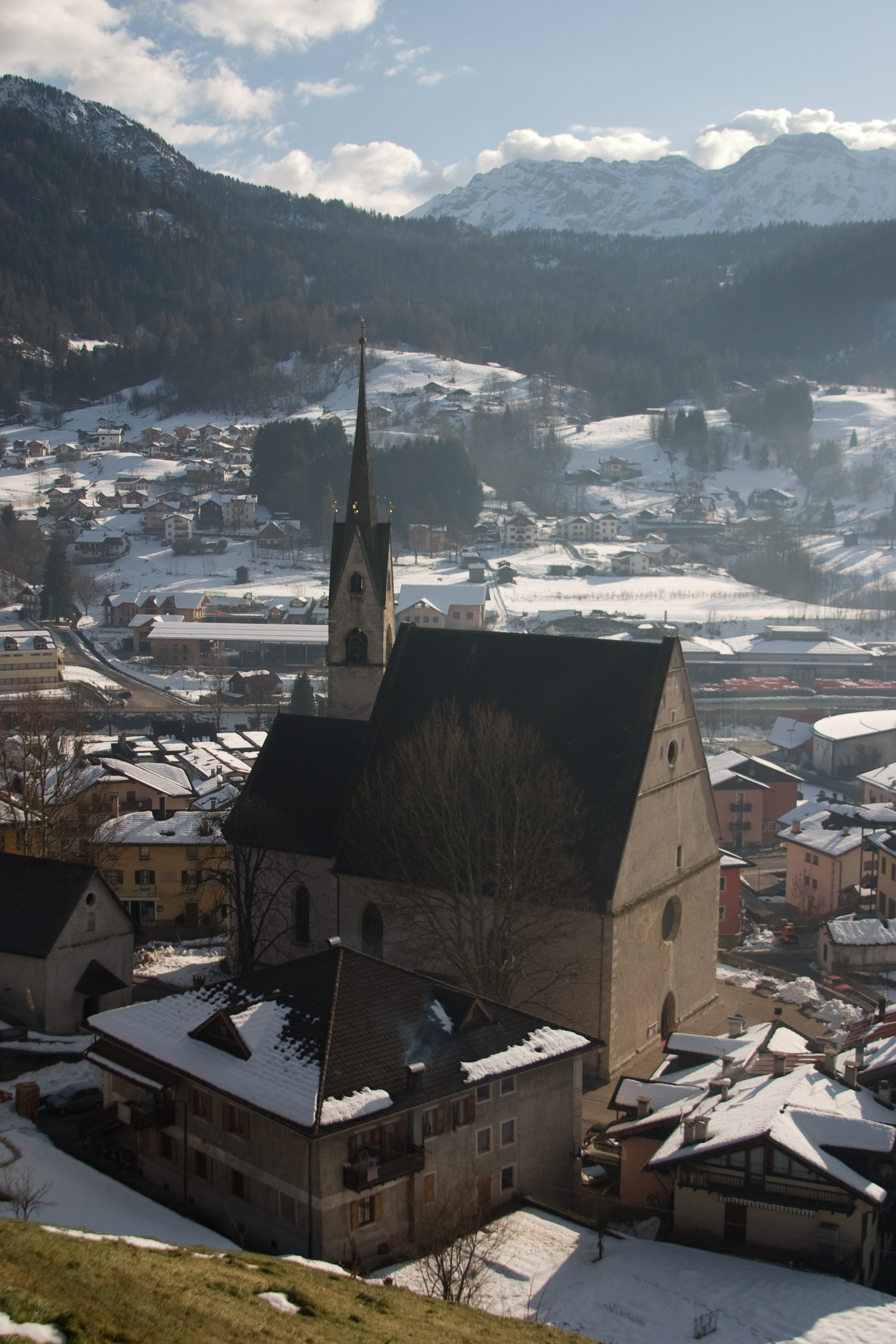 Fiera di Primiero